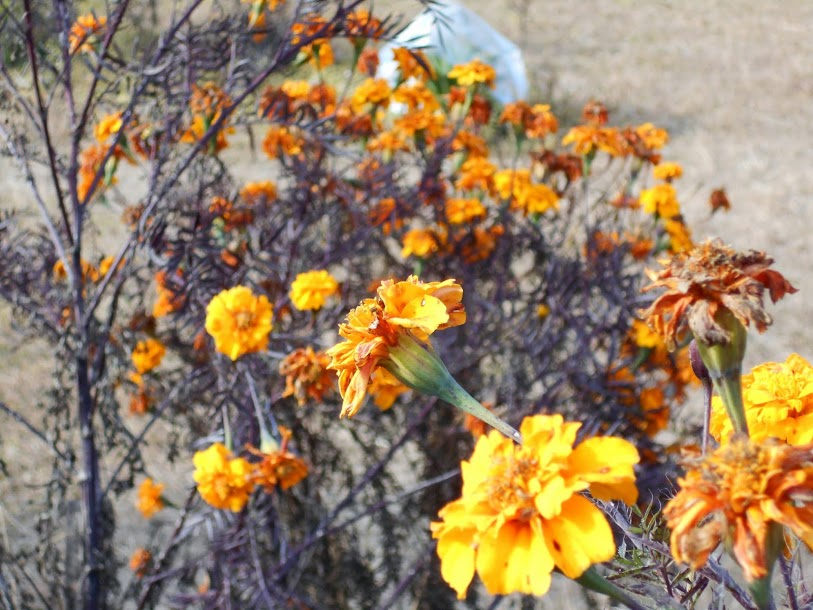 नेपाली: सयपत्री फूल